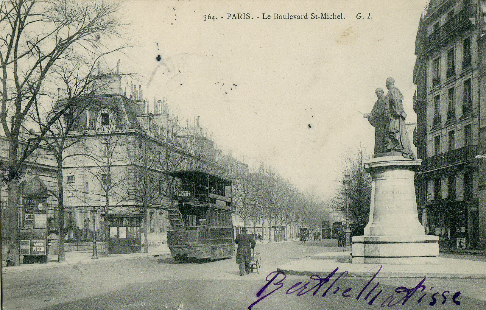 Carte postale ancienne éditée par GI, N°364Paris : Le Boulevard Saint-Michel - Monument à Pierre Joseph Pelletier et Joseph Bienaimé Caventou, groupe en bronze d'Édouard Lormier (1849-1919), envoyé à la fonte en 1942.